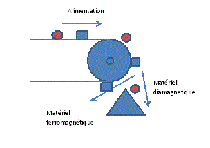 Les pièces circulent sur un convoyeur. Les pièces diamagnétiques sont séparées des pièces ferromagnétiques par l'aimant à l'intérieur de la poulie.